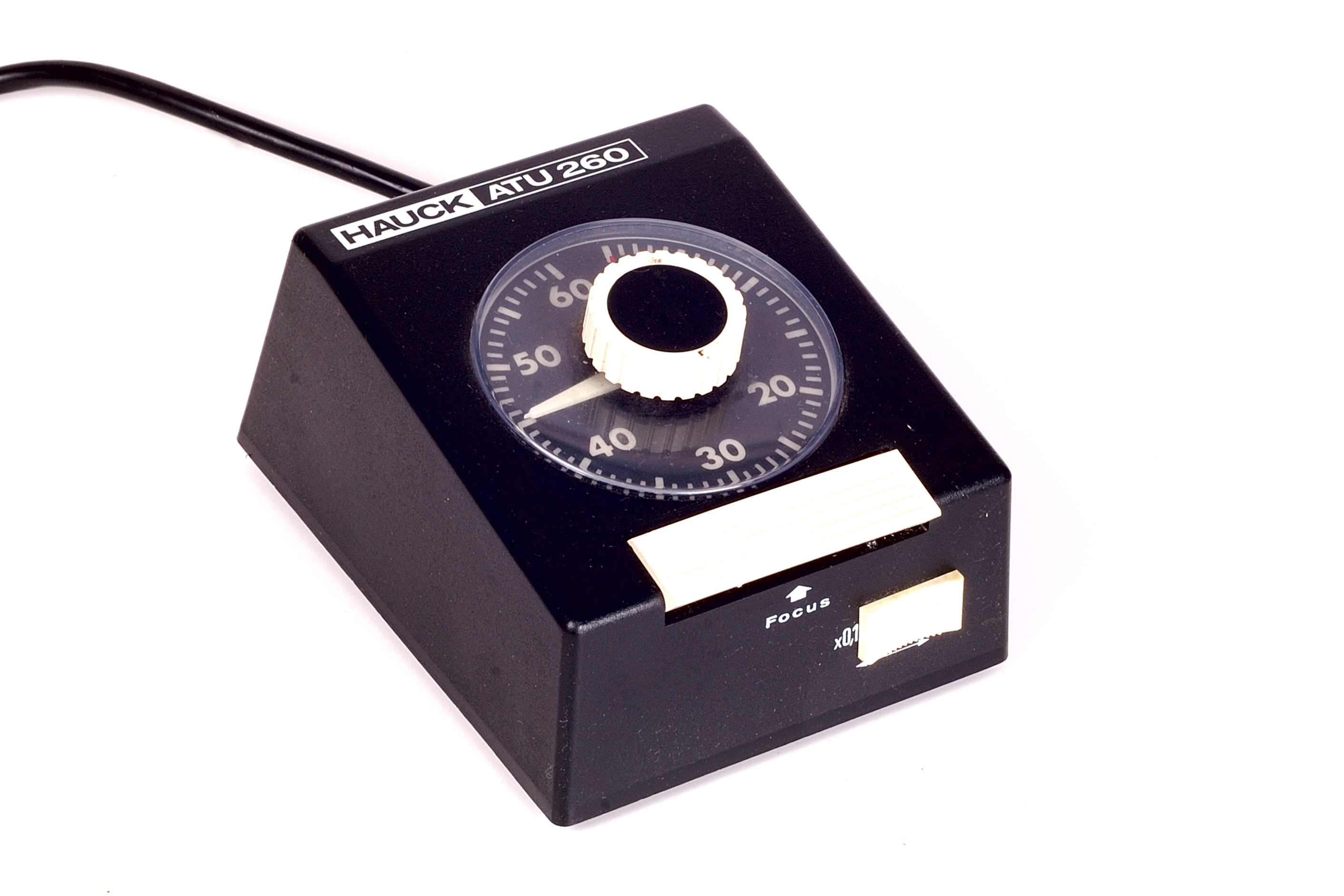 Belichtungsschaltuhr